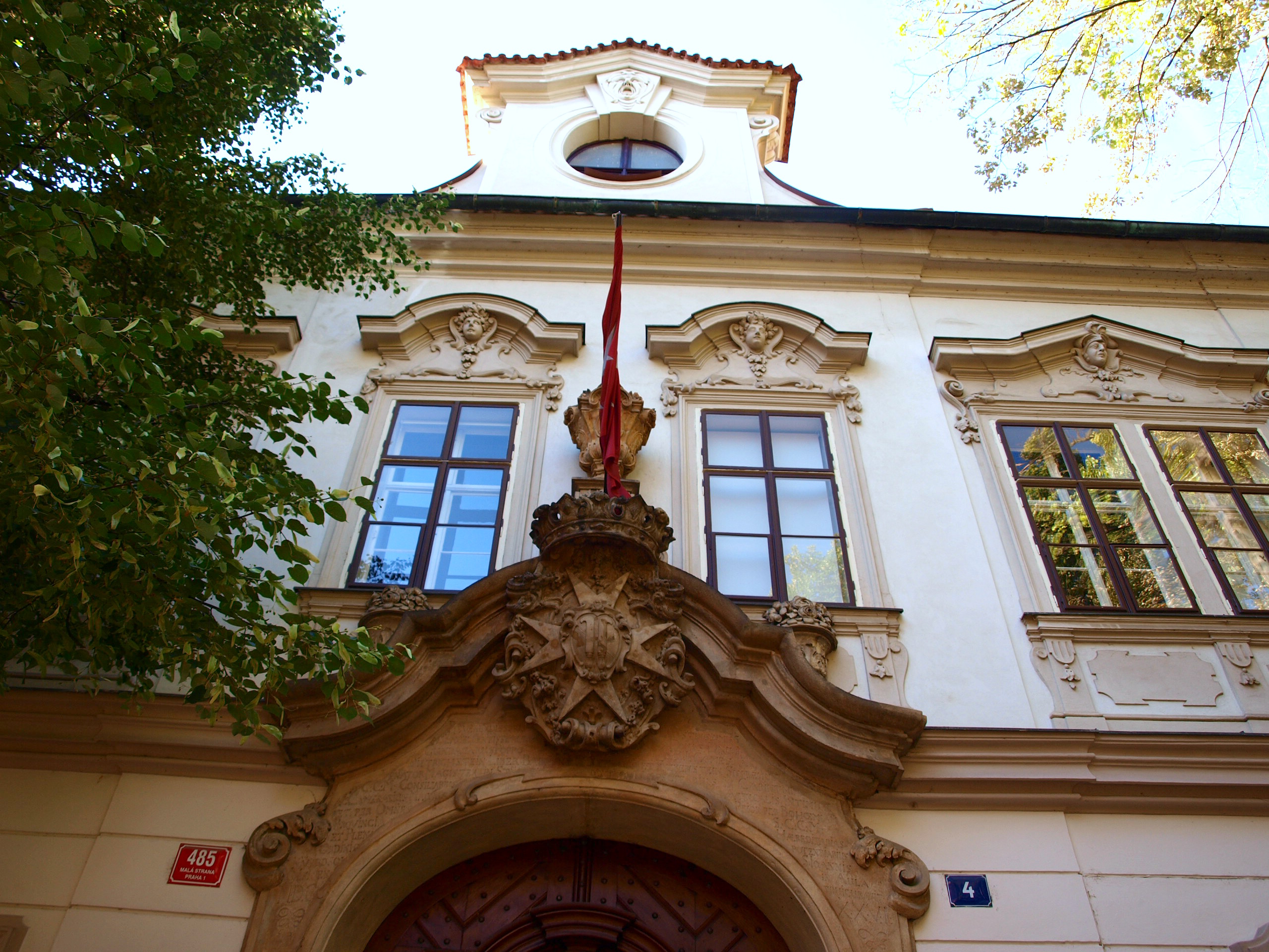 Velkopřevorský palác, Malá Strana